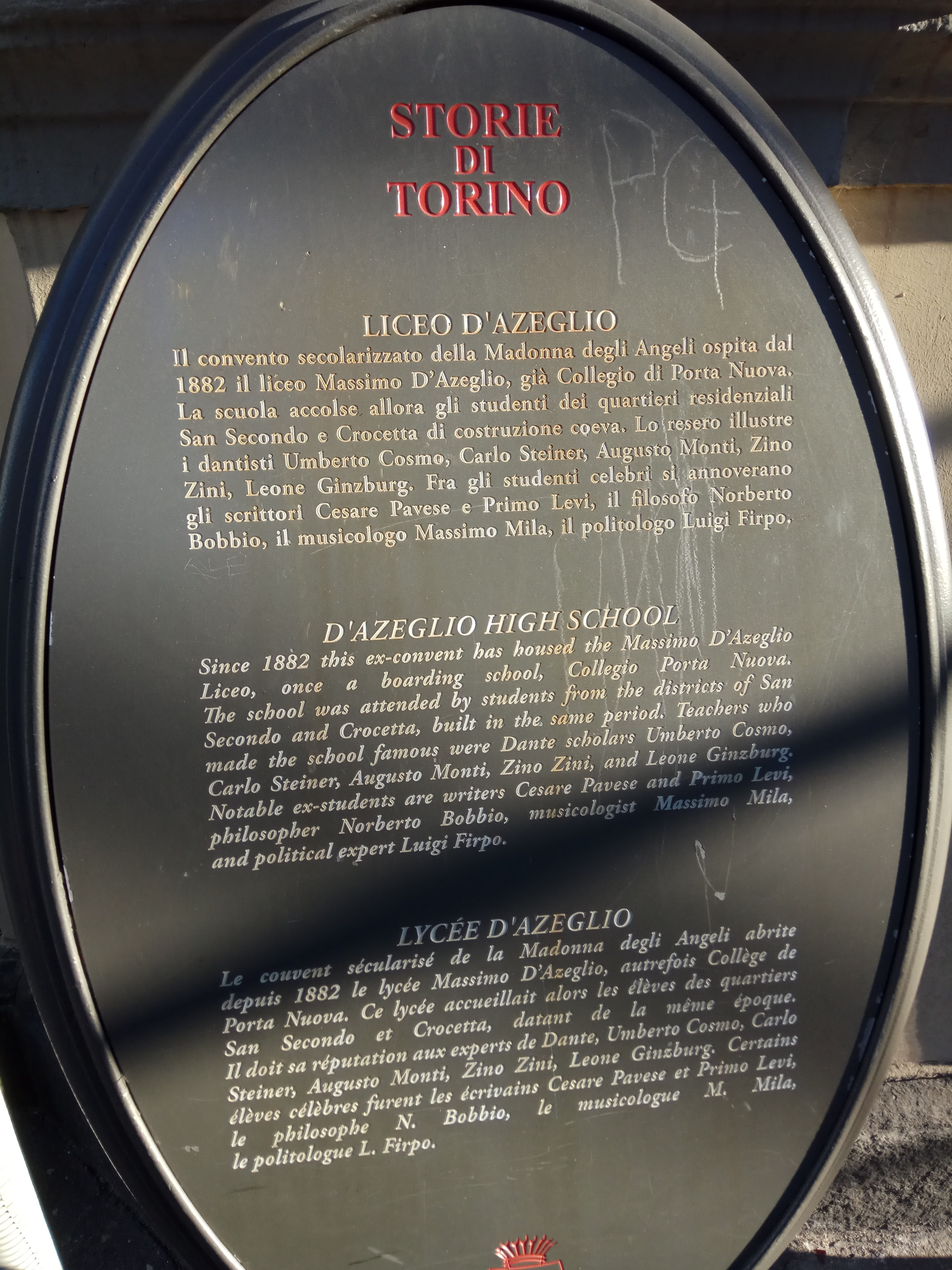 Massimo D'Azeglio Liceo History